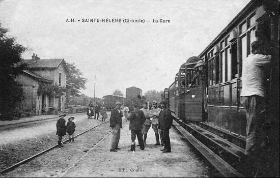 La gare de Sainte-Hélène ; début du XXe siècle.